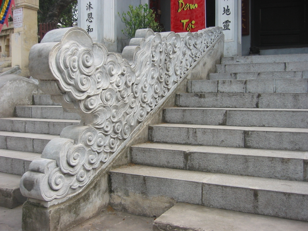 Hình trạm khắc đá tại cổng đền Kim Liên, trấn phía Nam trong Thăng Long tứ trấn